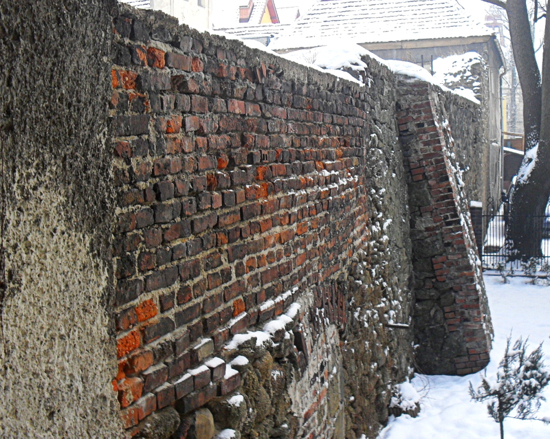 Kamienna Góra - mury miejskie, XV w. (zabytek nr rejestr. 597 z 25.08.1959)